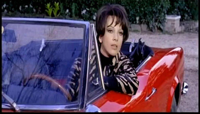 Corinne Fontaine in una scena del film Quarta parete (1968) regia di Adriano Bolzoni